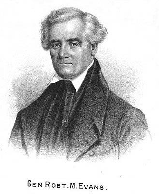 Gen. Robert Morgan Evans